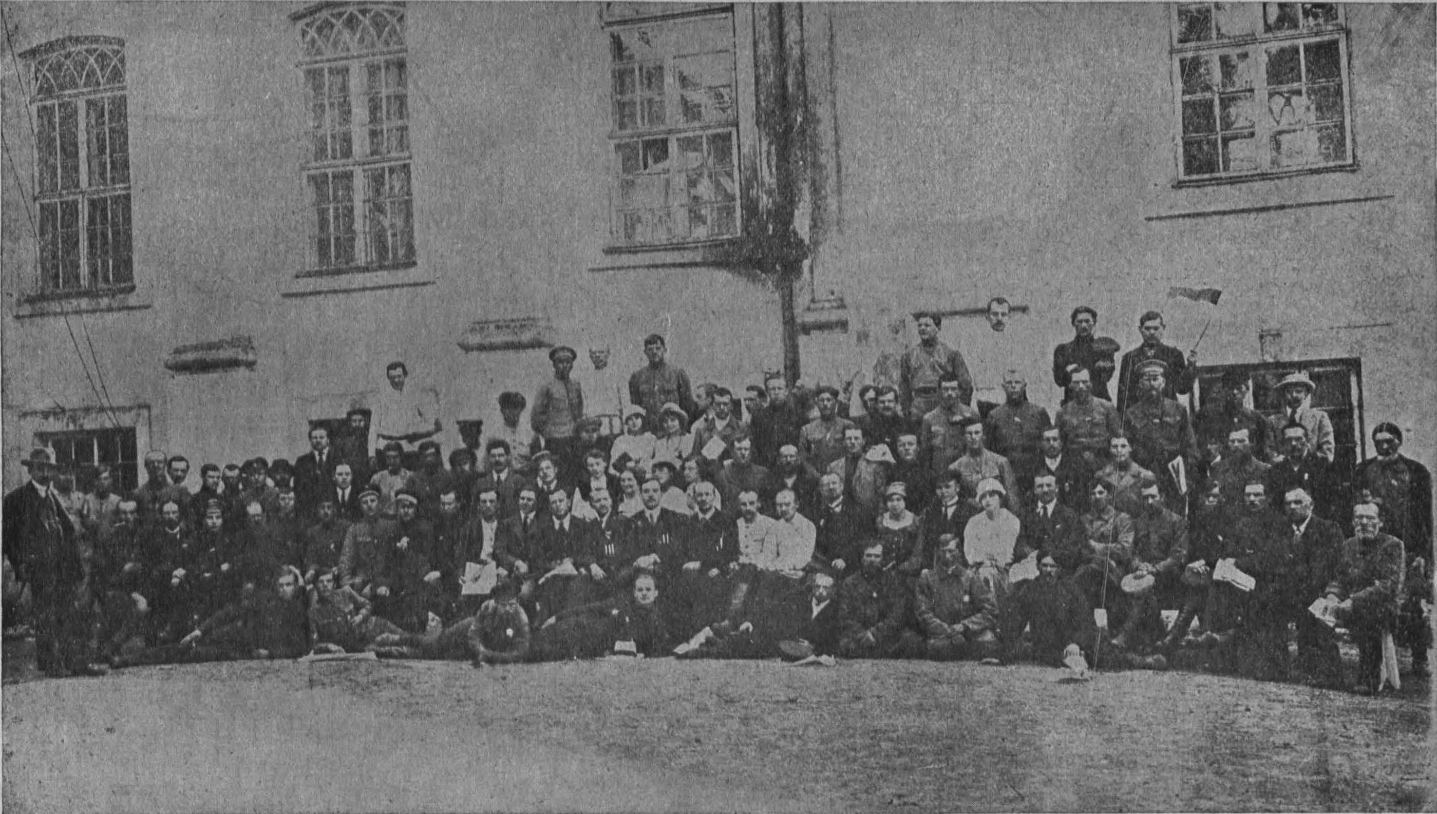 Беларускі з’езд Віленшчыны і Гродзеншчыны, удзельнікі з’езда.